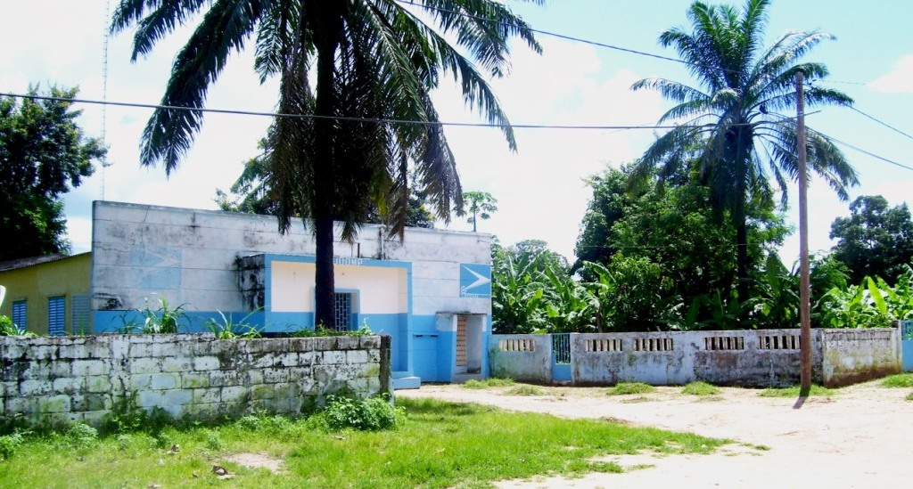 Goudomp, office de la poste